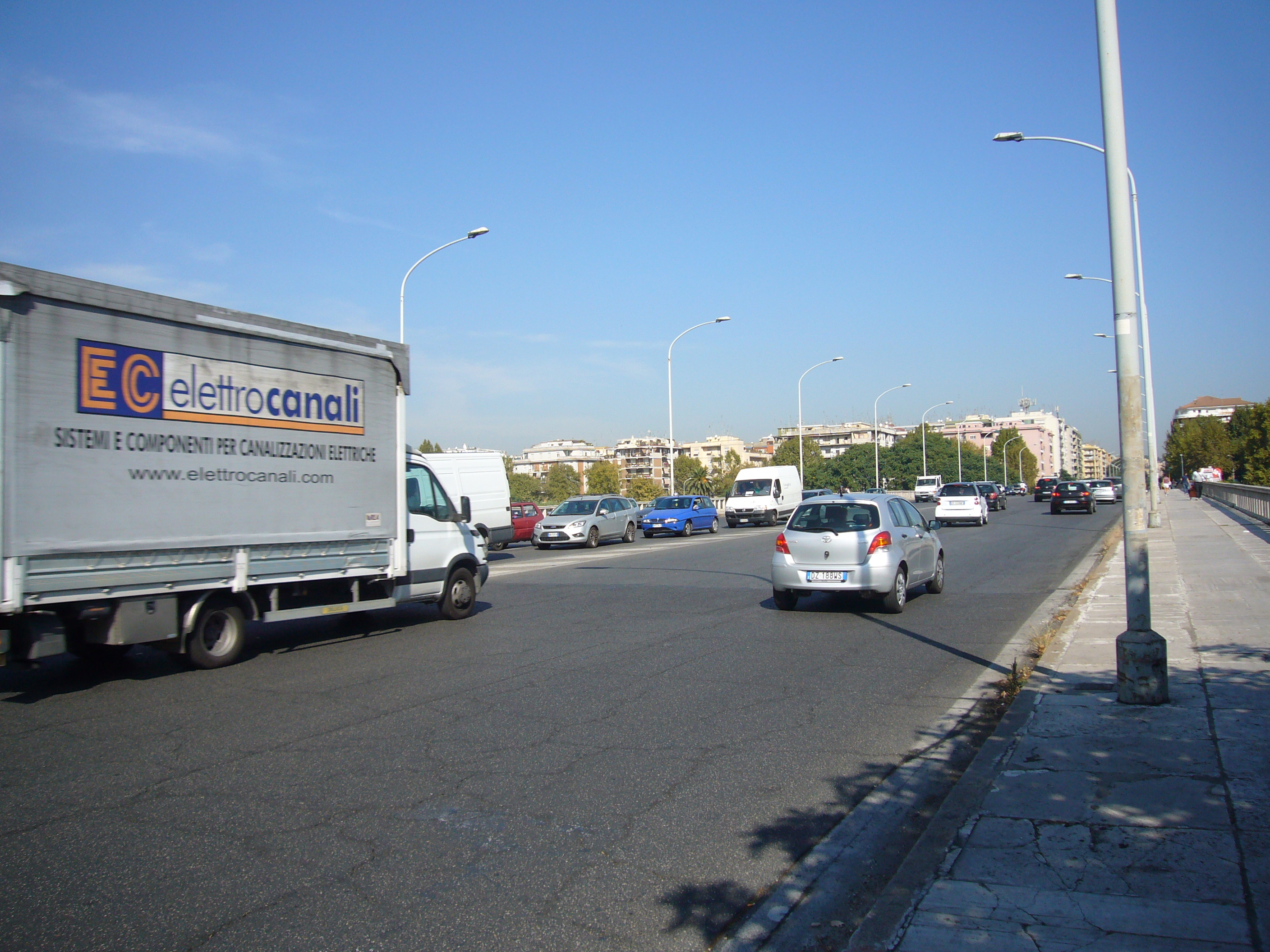 Roma, ponte Marconi, vista verso Portuense